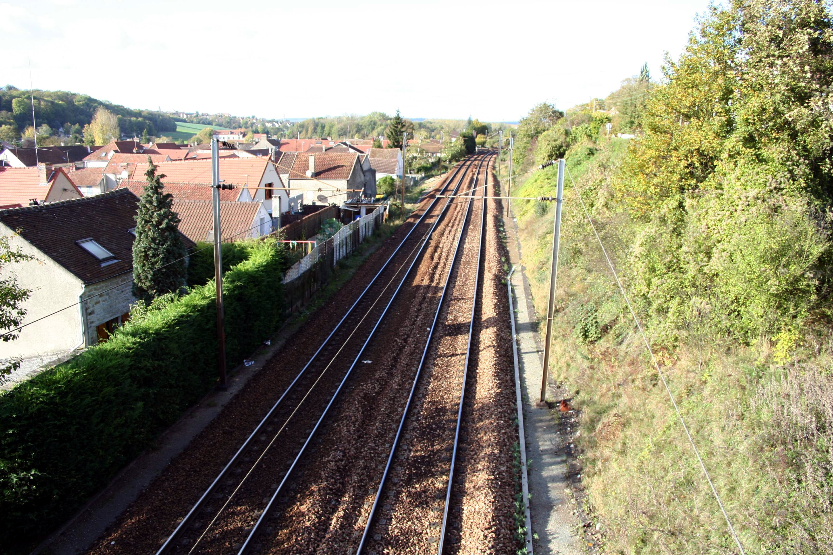 Ligne de la vallée de la Mauldre à la traversée de Nézel - Yvelines (France)